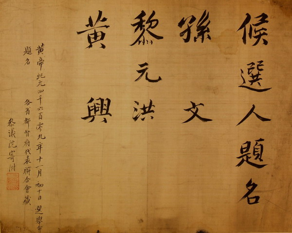 1911年中华民国临时大总统候选人题名